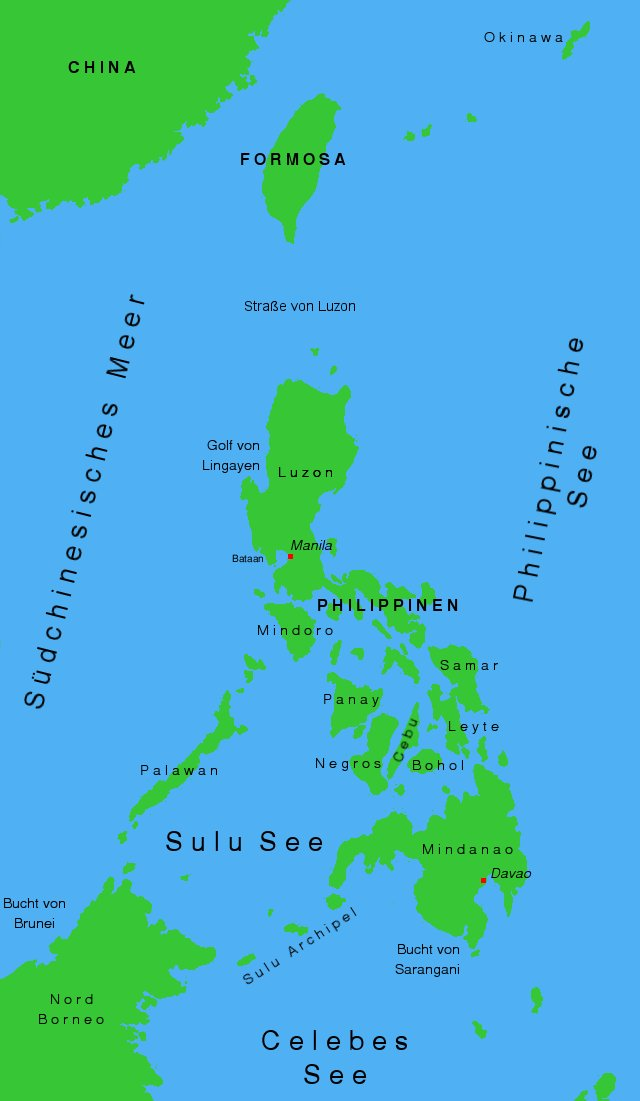 Gebiet der Philippinen